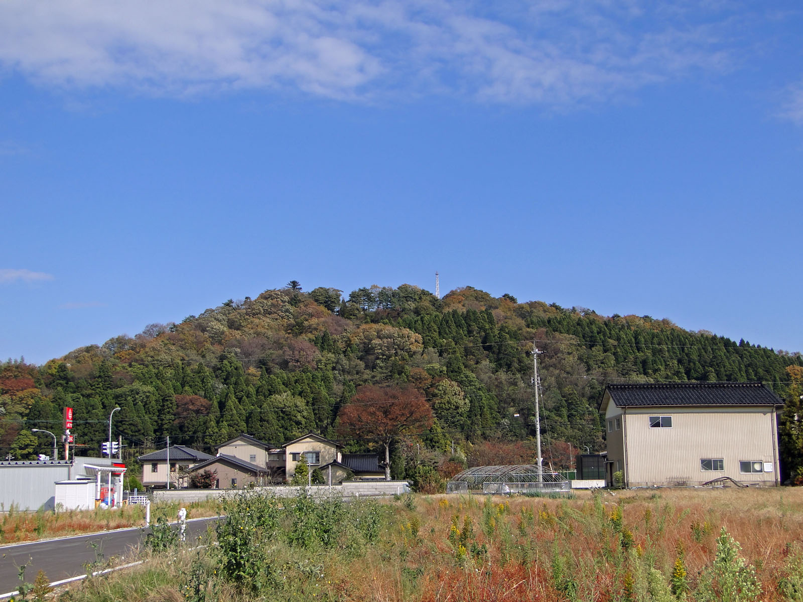 青柳古戦場から見た天神山